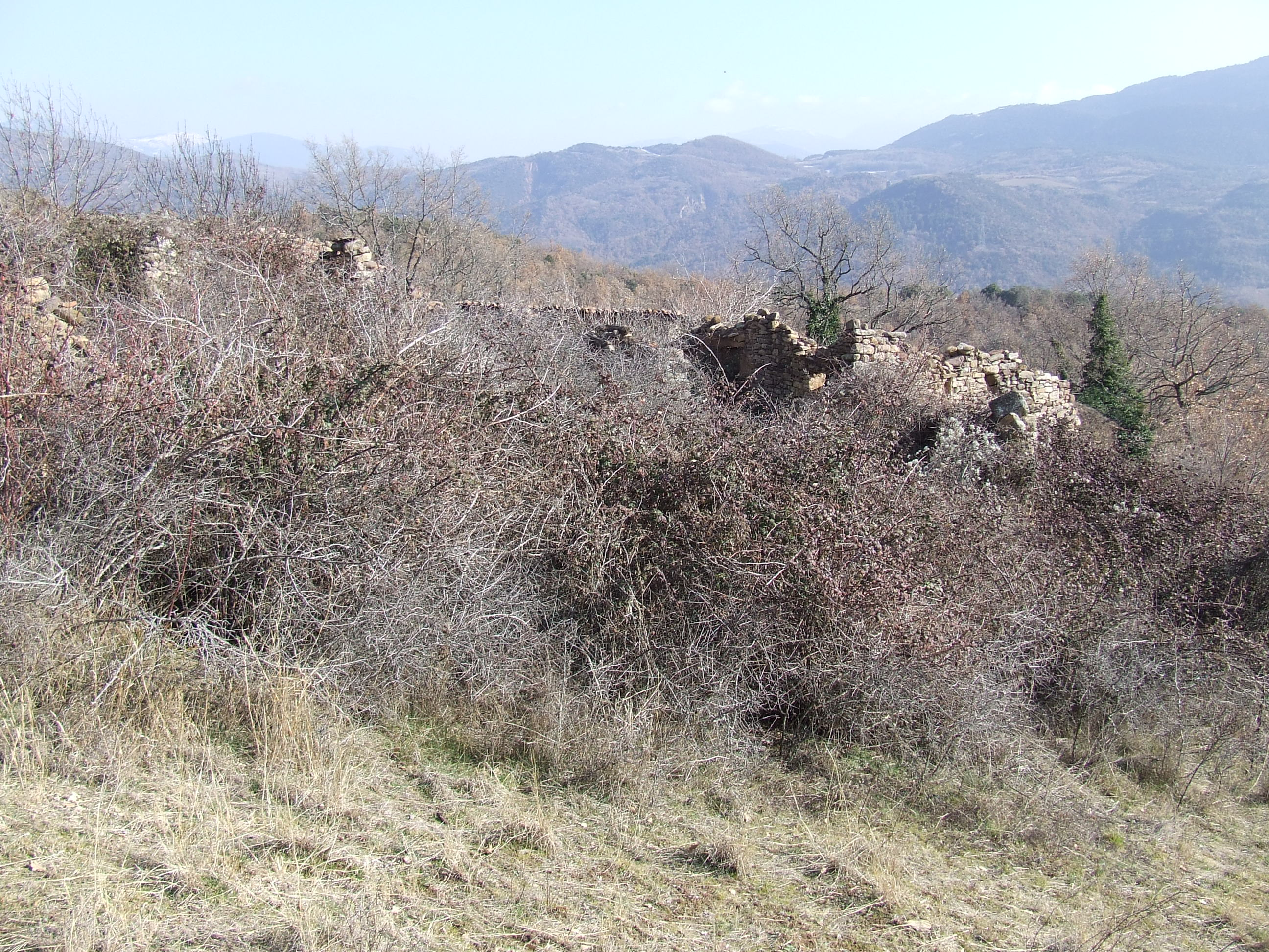 Estat actual de les Bordes d'Estavill (la Pobleta de Bellveí, la Torre de Cabdella, Pallars Jussà)